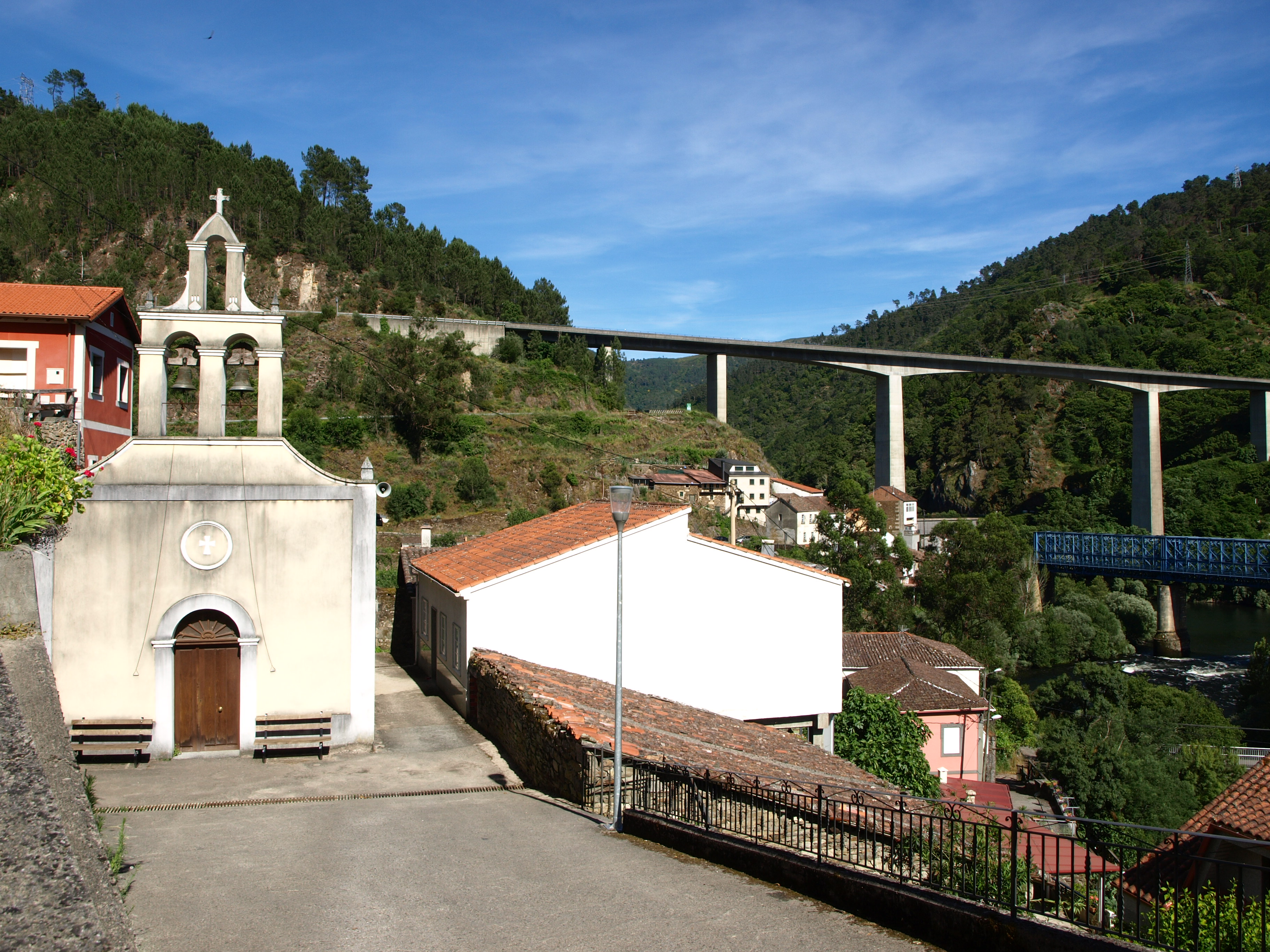 Capela en Os Peares.